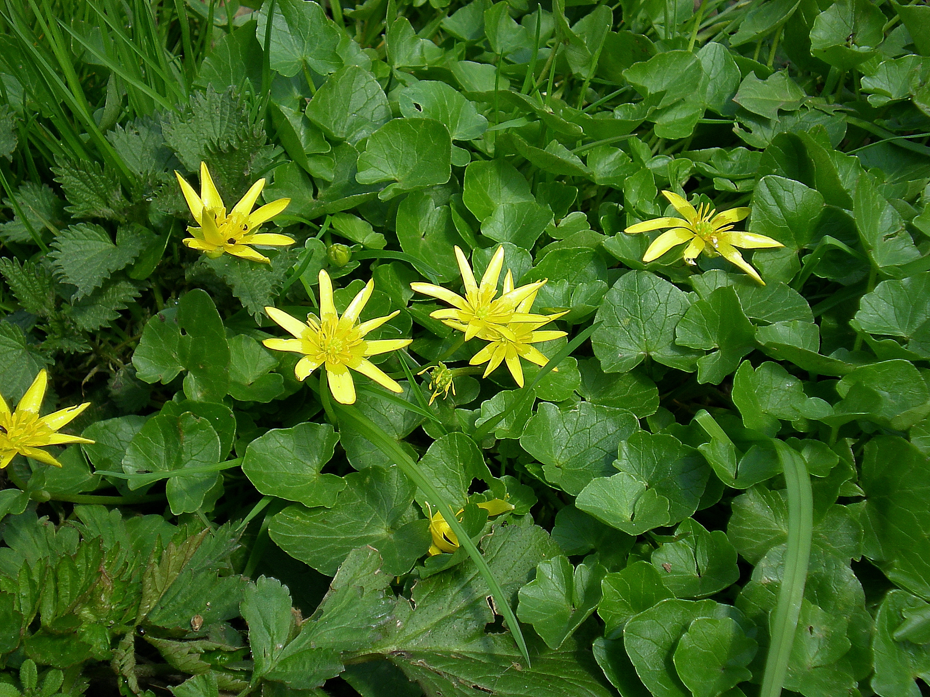 Ranunculus ficaria